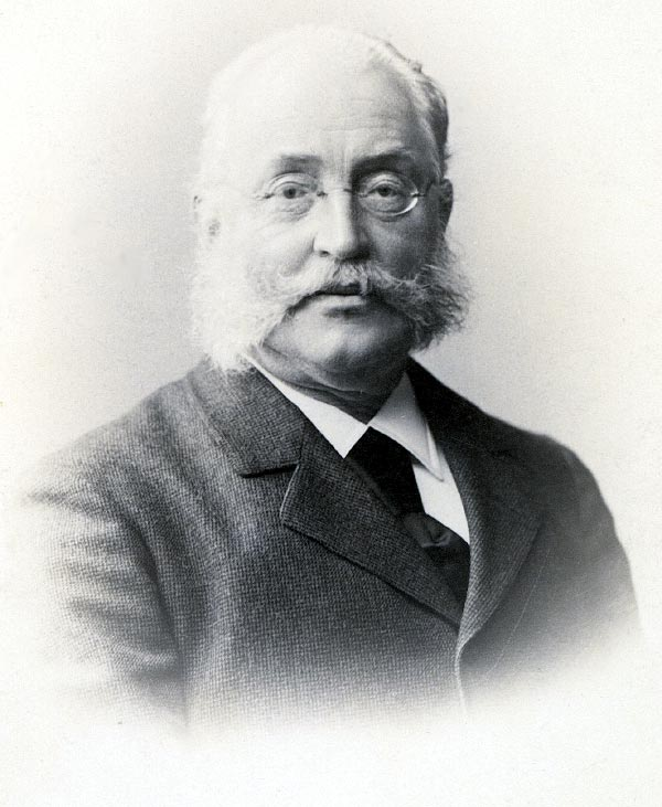 Max Eyth Bildunterschrift: Fritz Leyde & Co. - Berlin W., Unter den Linden 16. Hof-Photographen Jhrer Kgl.Hoheit der Frau Erbprinzessin von Sachsen-Meiningen Prinzessin von Preussen. Rückseite: Meinen Freunden in der Deutschen Landwirtschafts-Gesellschaft zum 30. September 1896